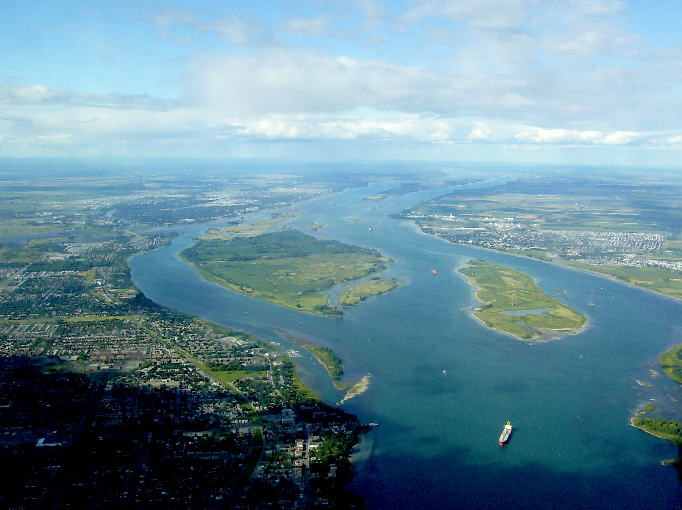 île de Montreal sur le Saint Laurent